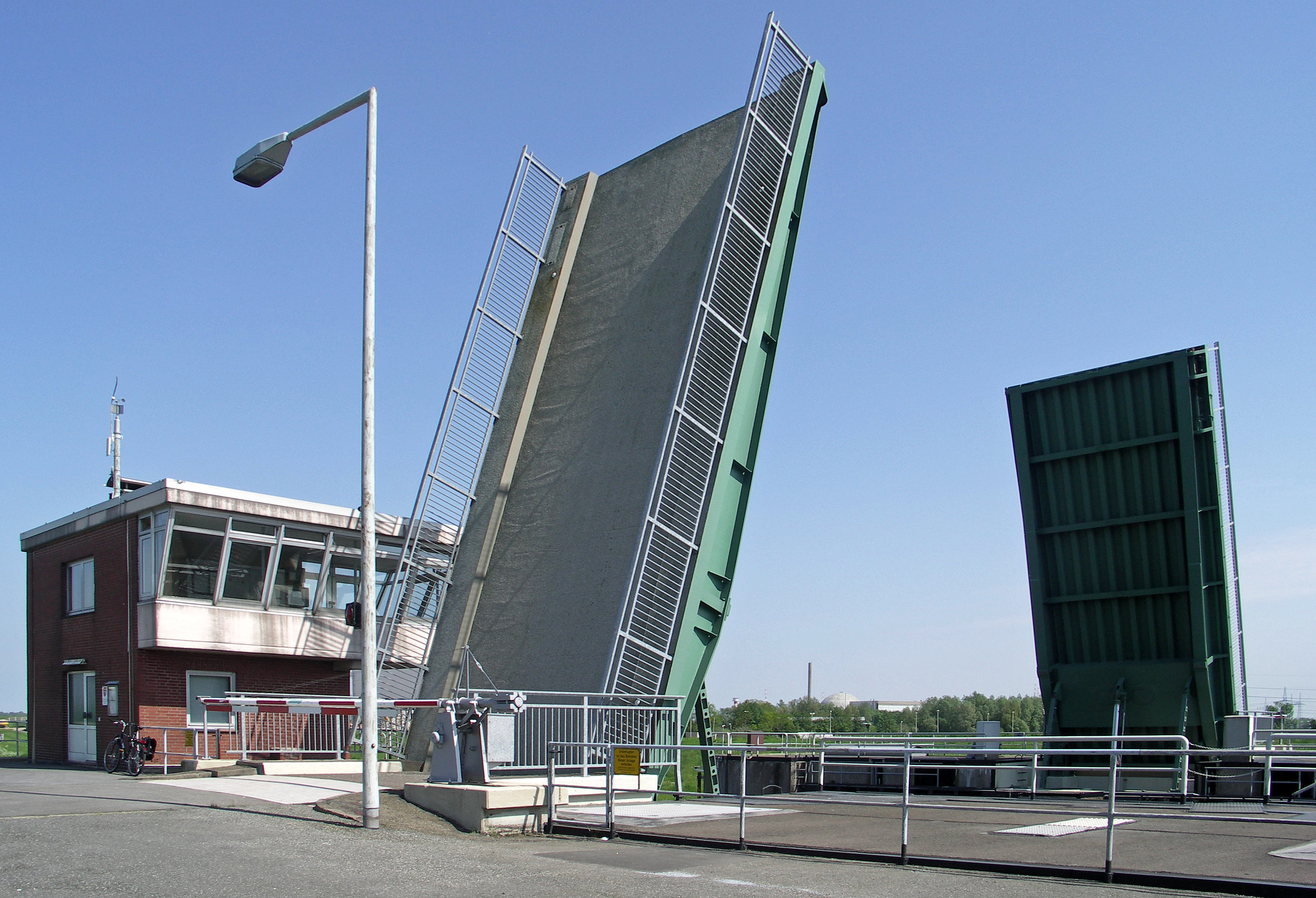 Schwingesperrwerk mit geöffneter Doppelklappbrücke